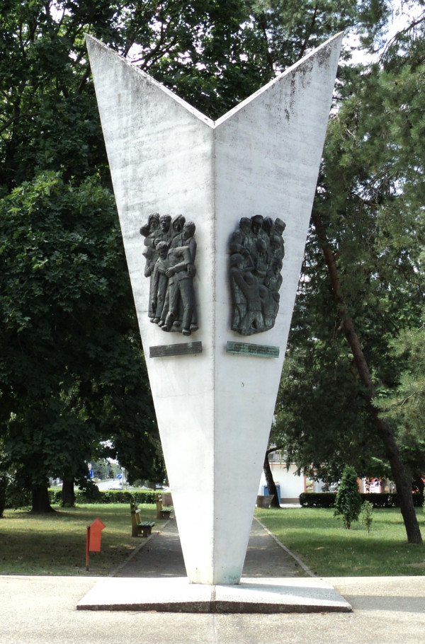 Споменик фотографисан 20. јула 2010. године у Доњем Михољцу. Аутор: Пламен